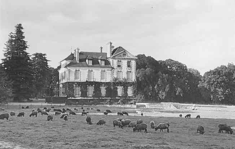 Photo prise dans le domaine du château du Vivier, à Fontenay-Trésigny (Seine-et-Marne) par mon grand-père au début des années 1930 : le bâtiment d'habitation et les moutons.